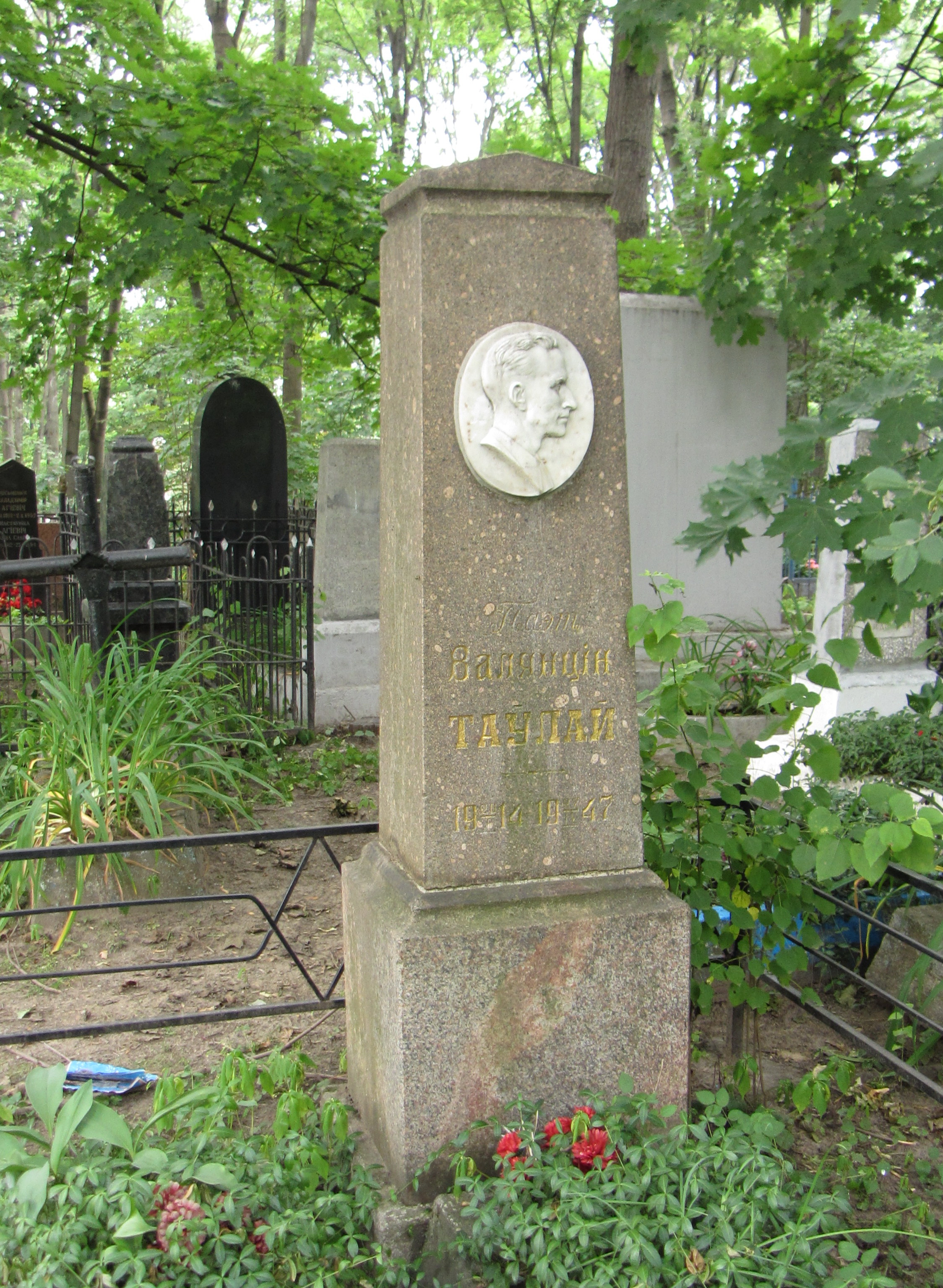 Беларуская (тарашкевіца): Помнік Валянціну Таўлаю. Вайсковыя могілкі, Менск